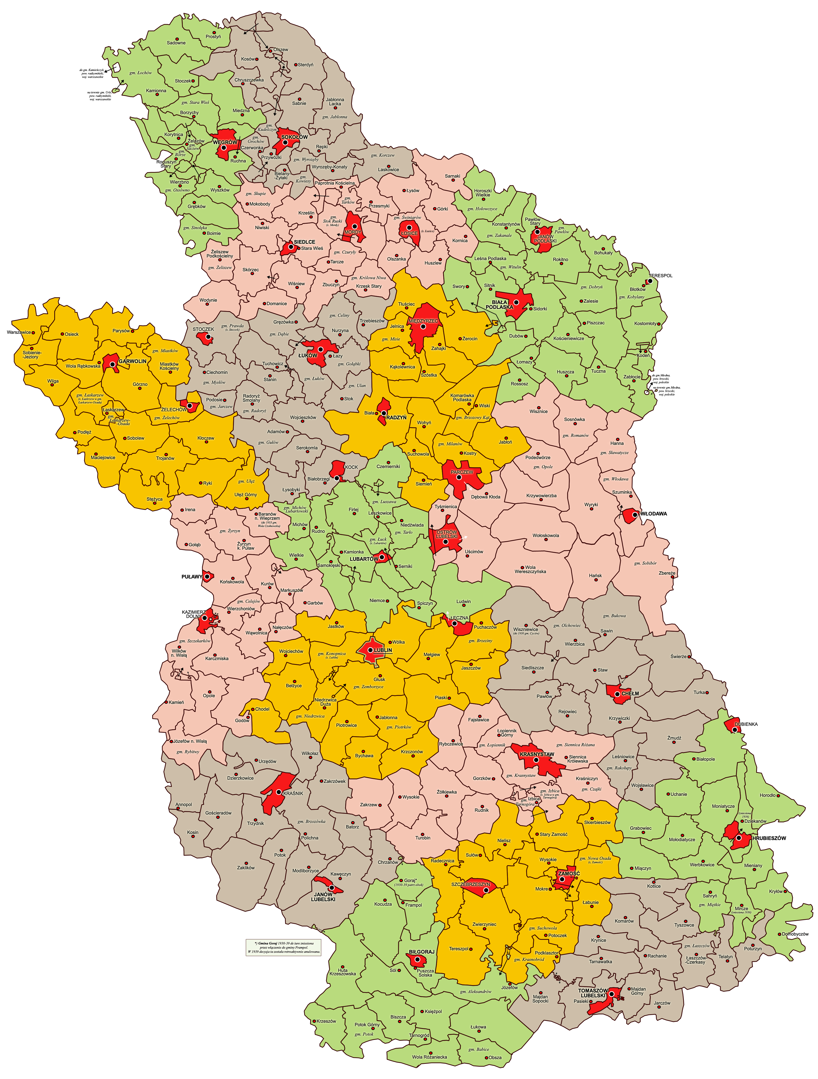 Polska: Mapa administracyjna województwa lubelskiego, stan na rok 1933 (Administrative map of Lublin Voivodeship as of 1933)